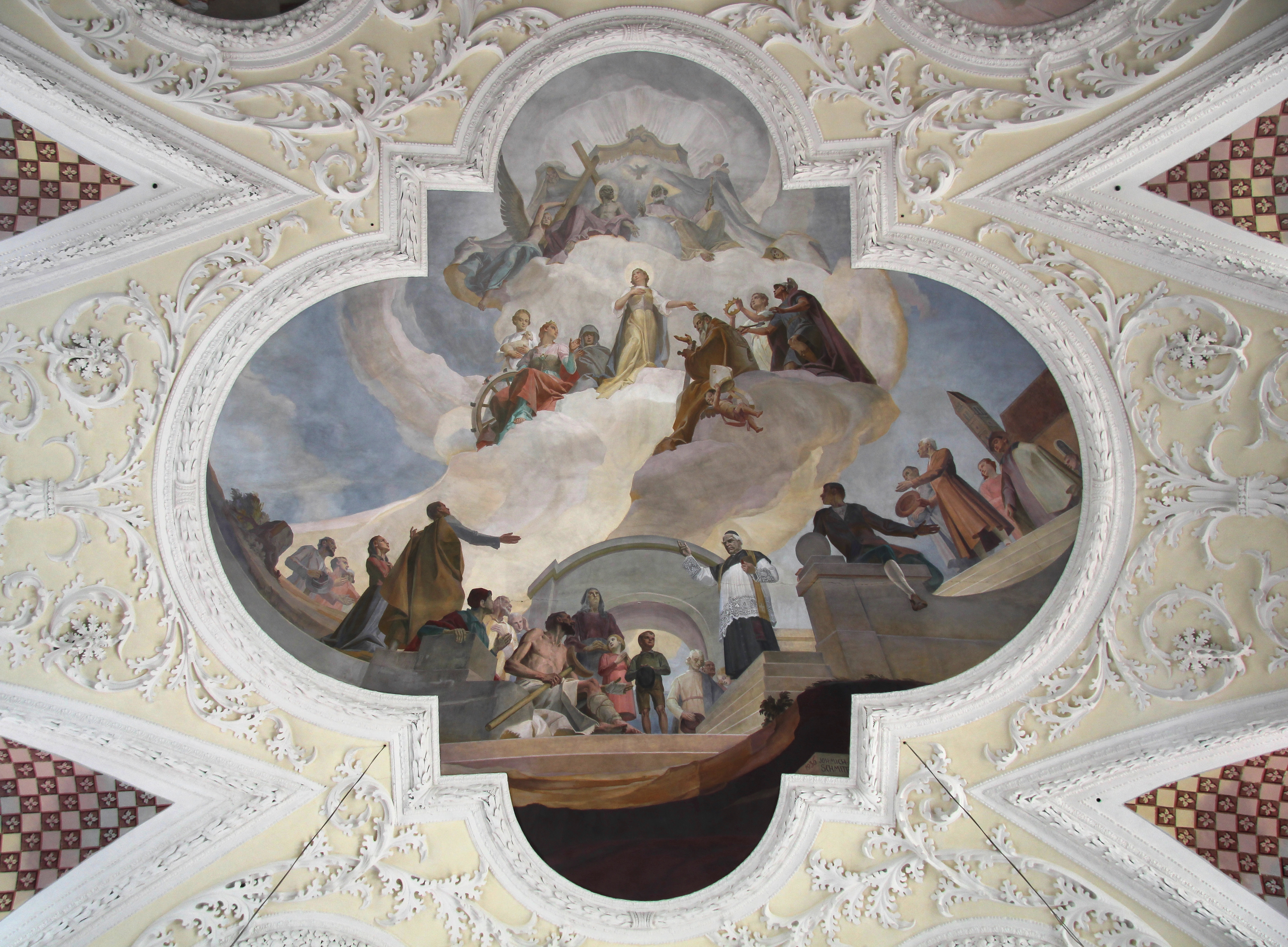 Stadtpfarrkirche St. Justina, Bad Wörishofen. Deckengemälde, 1936 von Johann Michael Schmitt (* 1878, † 10. März 1943) im Westteil der Kirche: Verehrung der Hl. Dreifaltigkeit durch die Heiligen Agnes, Katharina, Felicitas, Justina von Antijochien, Cyprian, Pancratius und Sebastian; unter der Himmelsöffnung steht Pfarrer Sebastian Kneipp und predigt Kranken und Gesunden. Sebastian Kneipp war von 1881 bis 1897 Pfarrer in St. Justina.